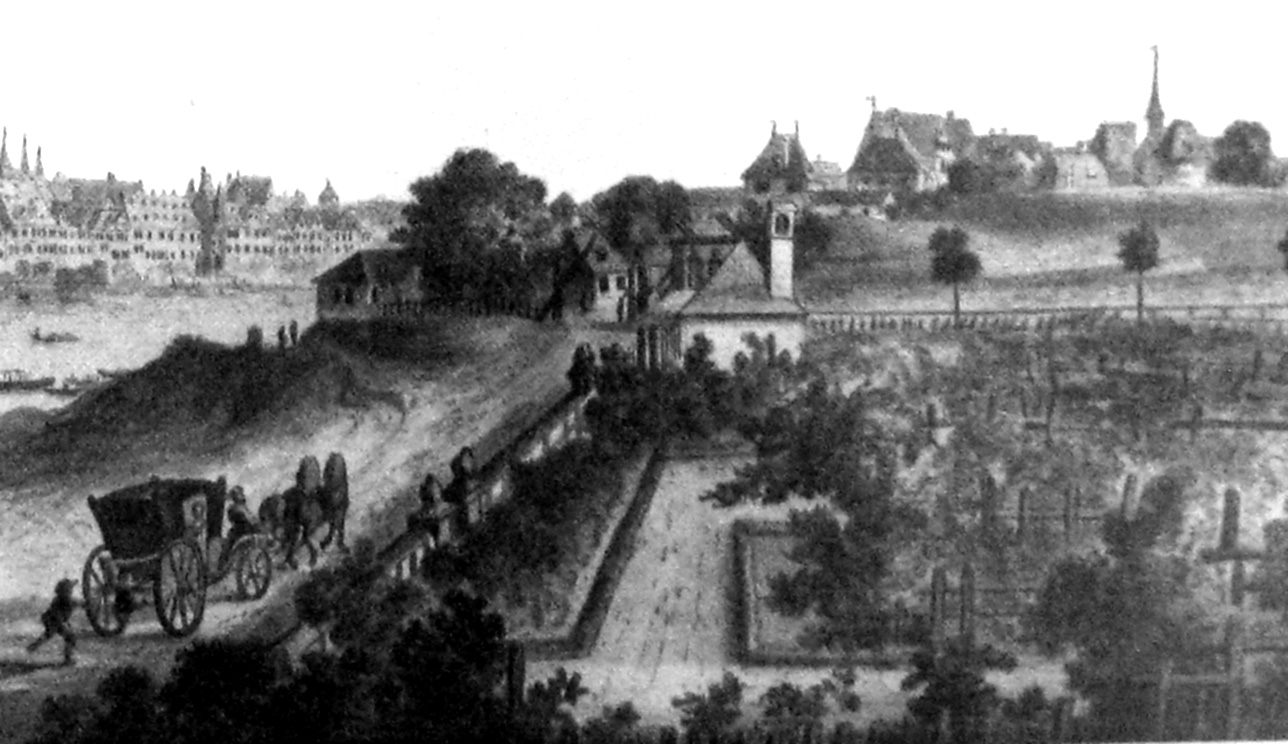 Garten vor dem Schaumaintor, um 1771-1784